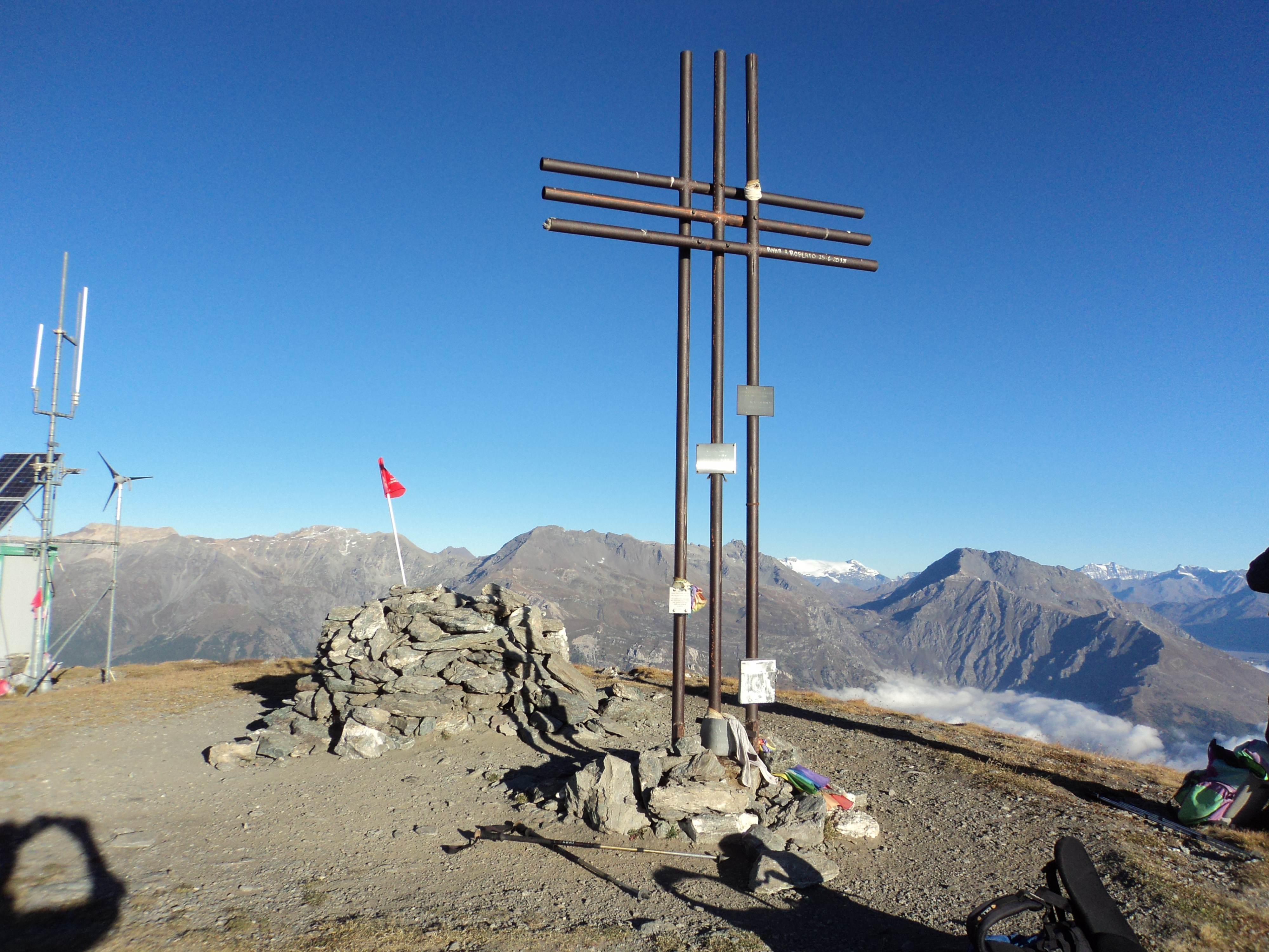 Vetta Ciantiplagna - Alpi Cozie - Provincia di Torino